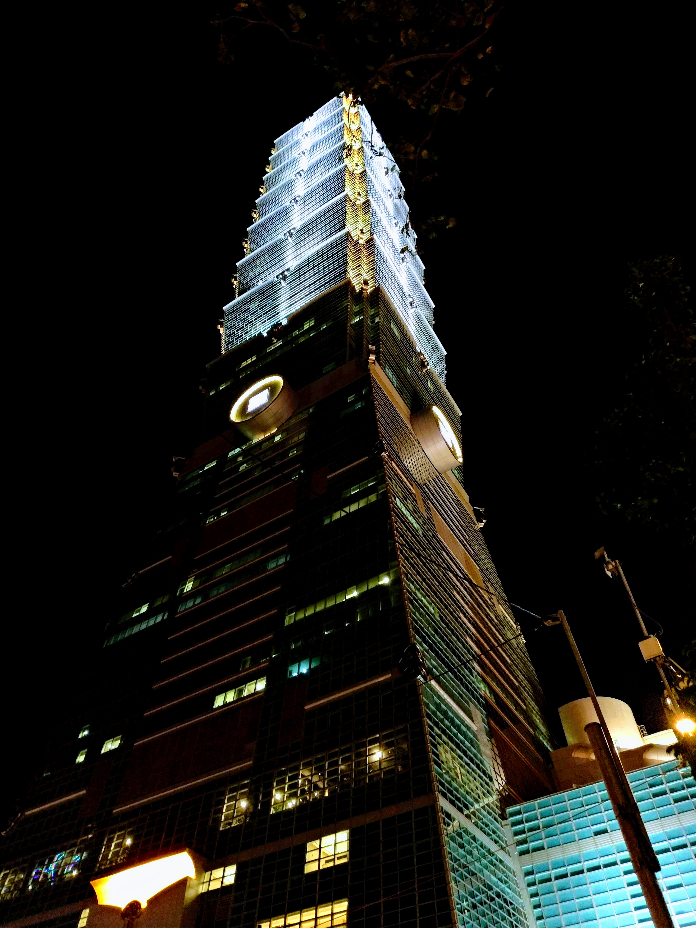 新版台北101外觀夜景燈光-2018年7月拍攝(星期三)